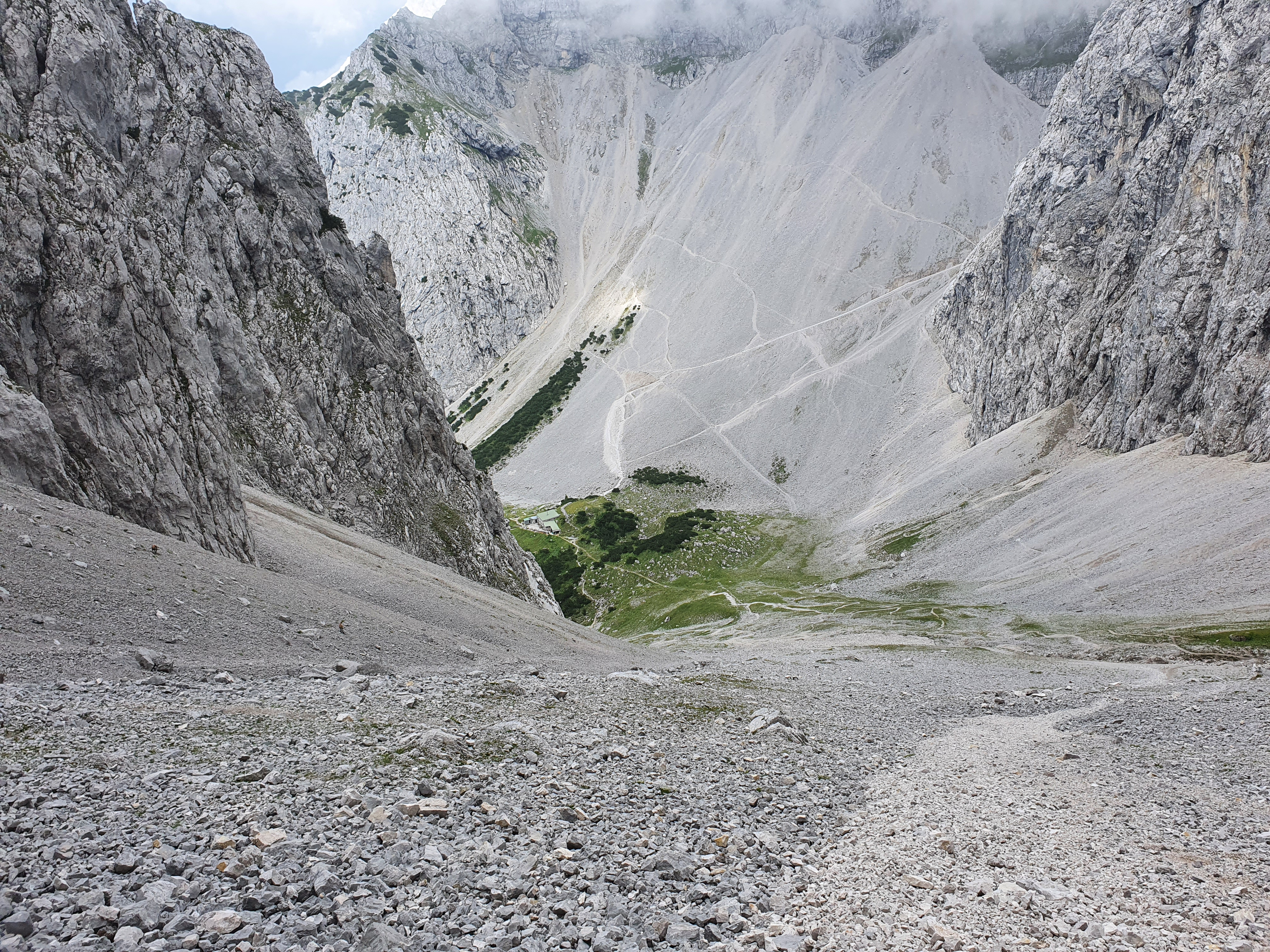 Ansicht der Dammkarhütte beim Abstieg durch das vordere Dammkar.